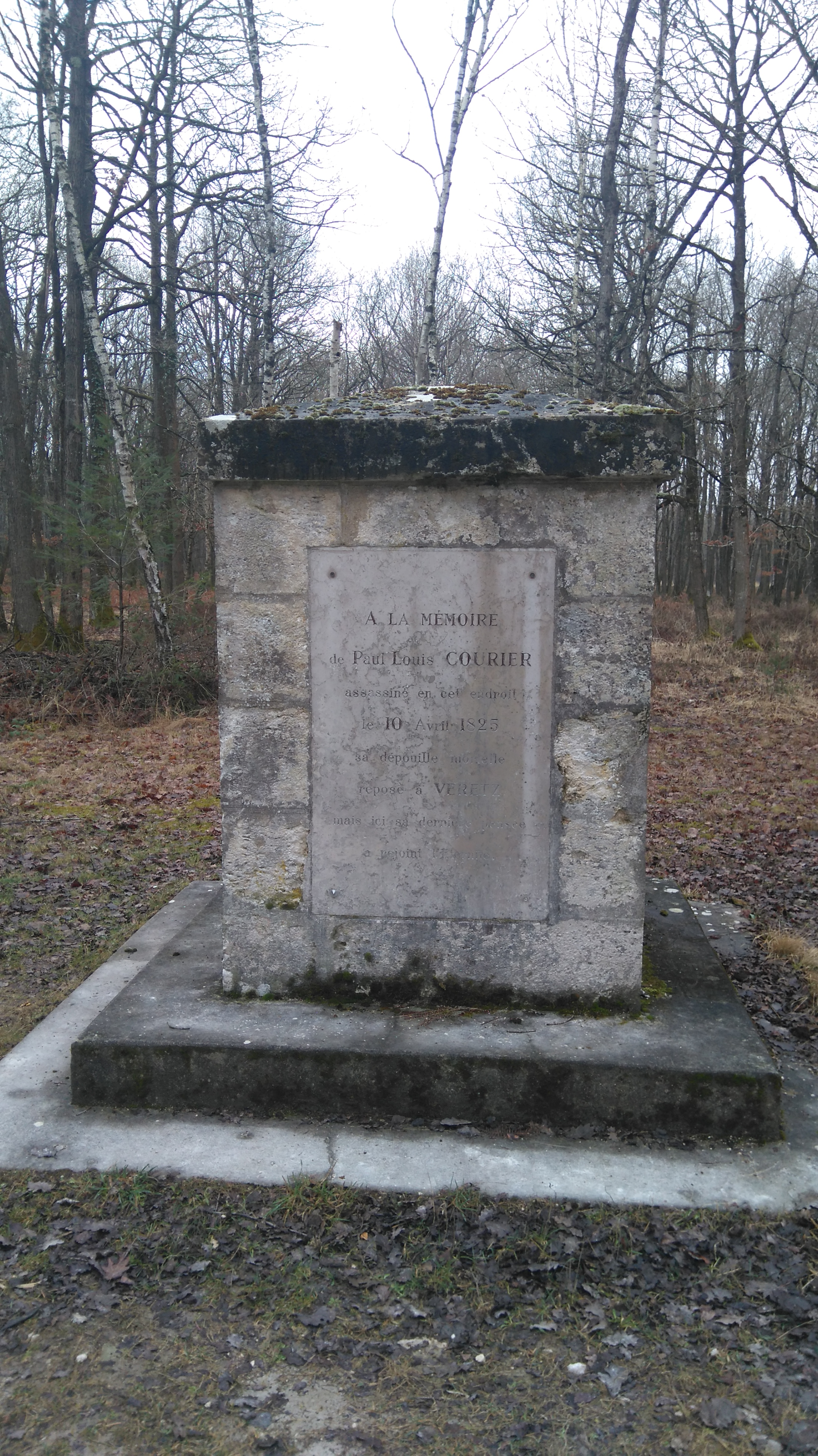 L'édifice se situe dans le bois de Larçay, près de Veretz. On peut y lire l'inscription suivante: " À LA MÉMOIRE de Paul Louis COURRIER assassiné en cet endroit le 10 Avril 1825 sa dépouille mortelle repose à VERETZ mais ici sa dernière pensée a rejoint l'Éternité"